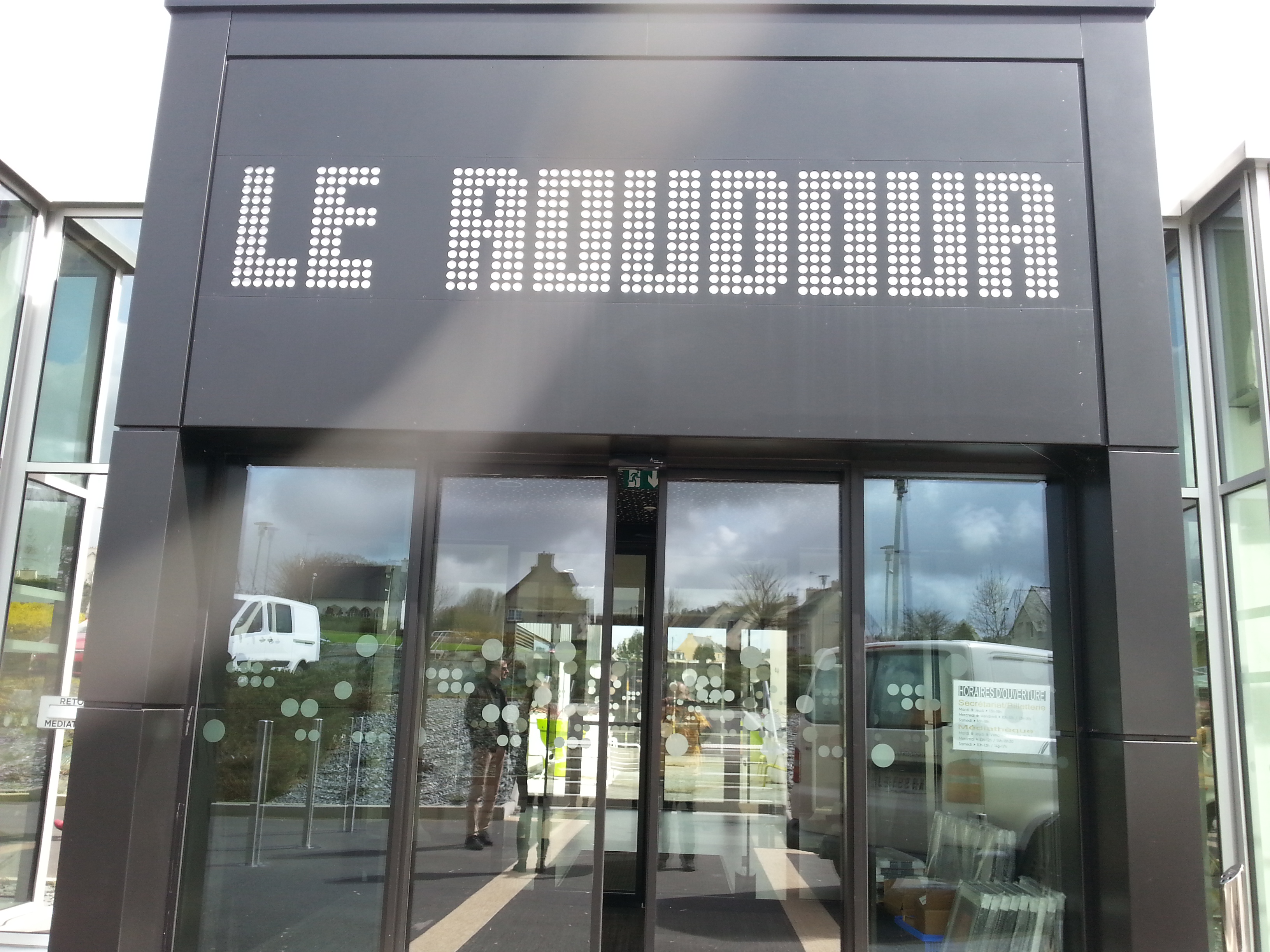 Saint-Thegonnec